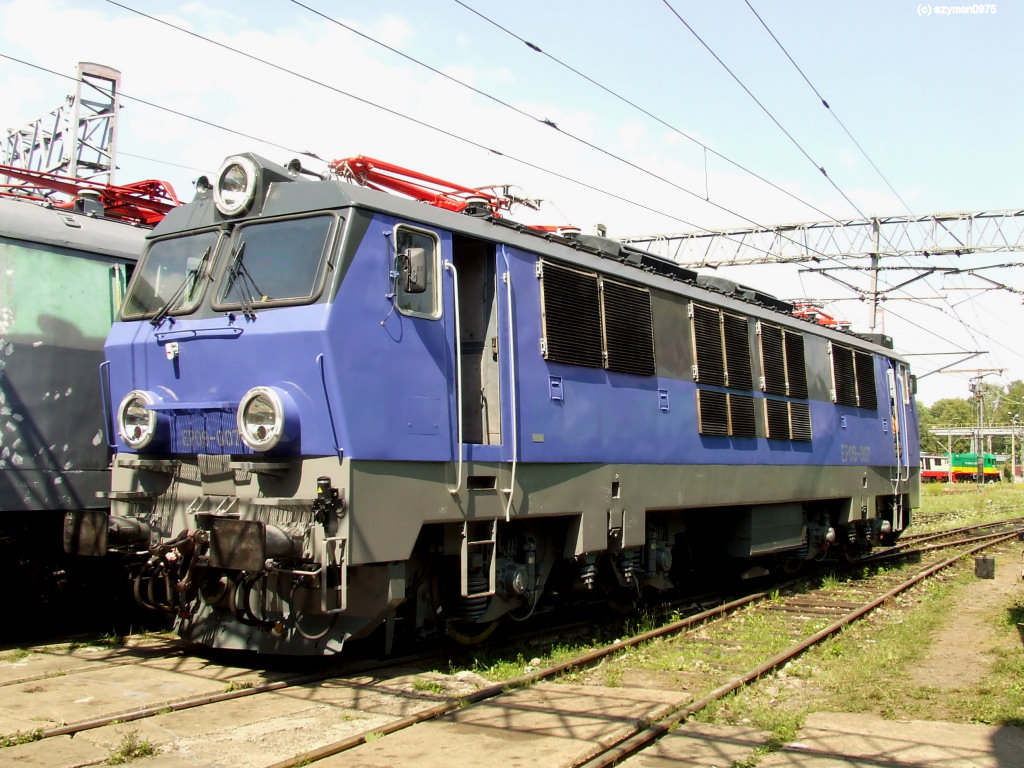 EP09-007 - elektryczna lokomotywa pasażerska produkcji polskiej.